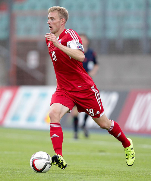 Laurent Jans im Trikot der luxemburgischen Fussballnationalmannschaft während des EM-Qualifikationsspiels zwischen Luxemburg und Mazedonien am 5. September 2015.